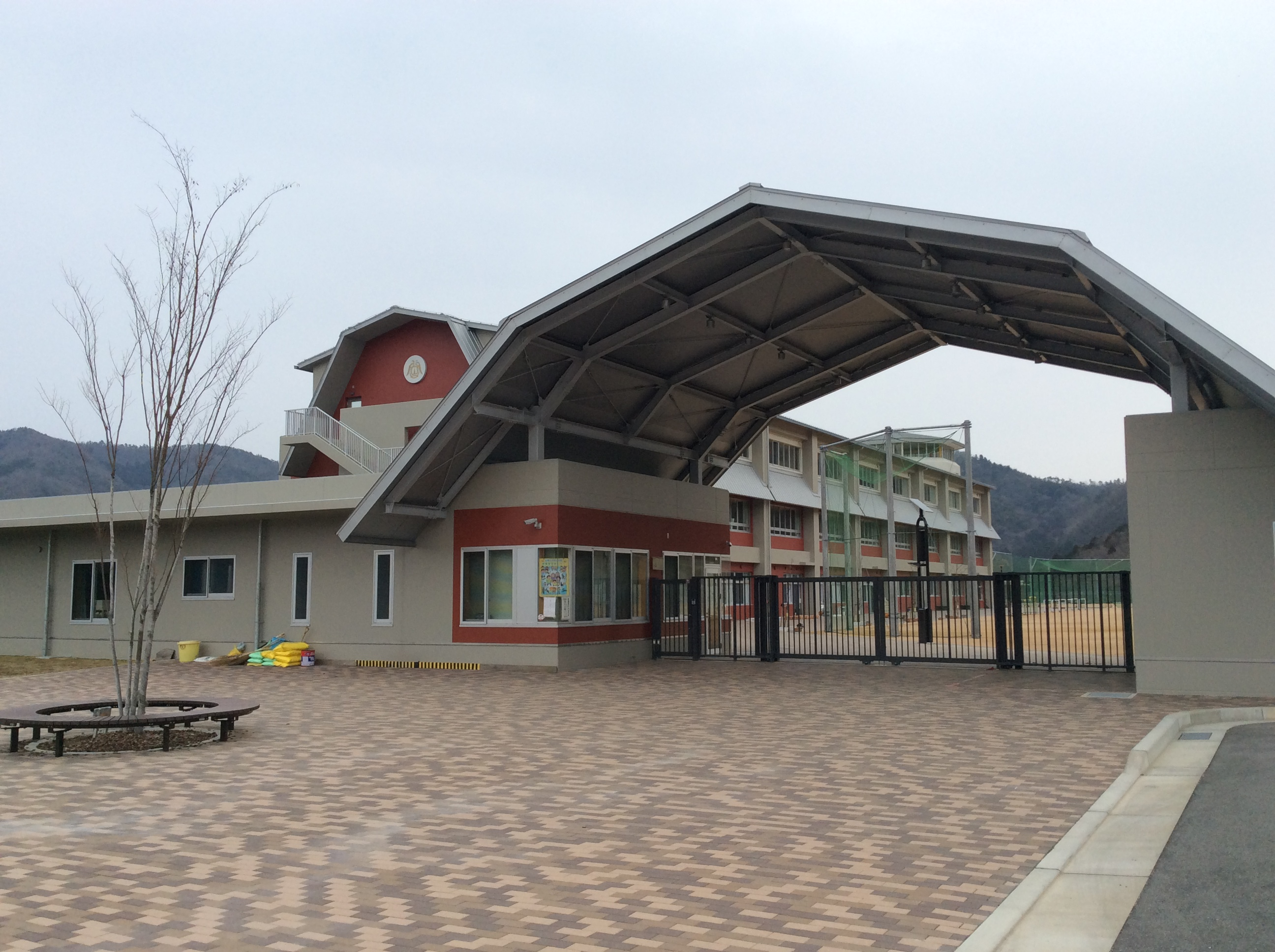 能勢町立能勢小学校・中学校